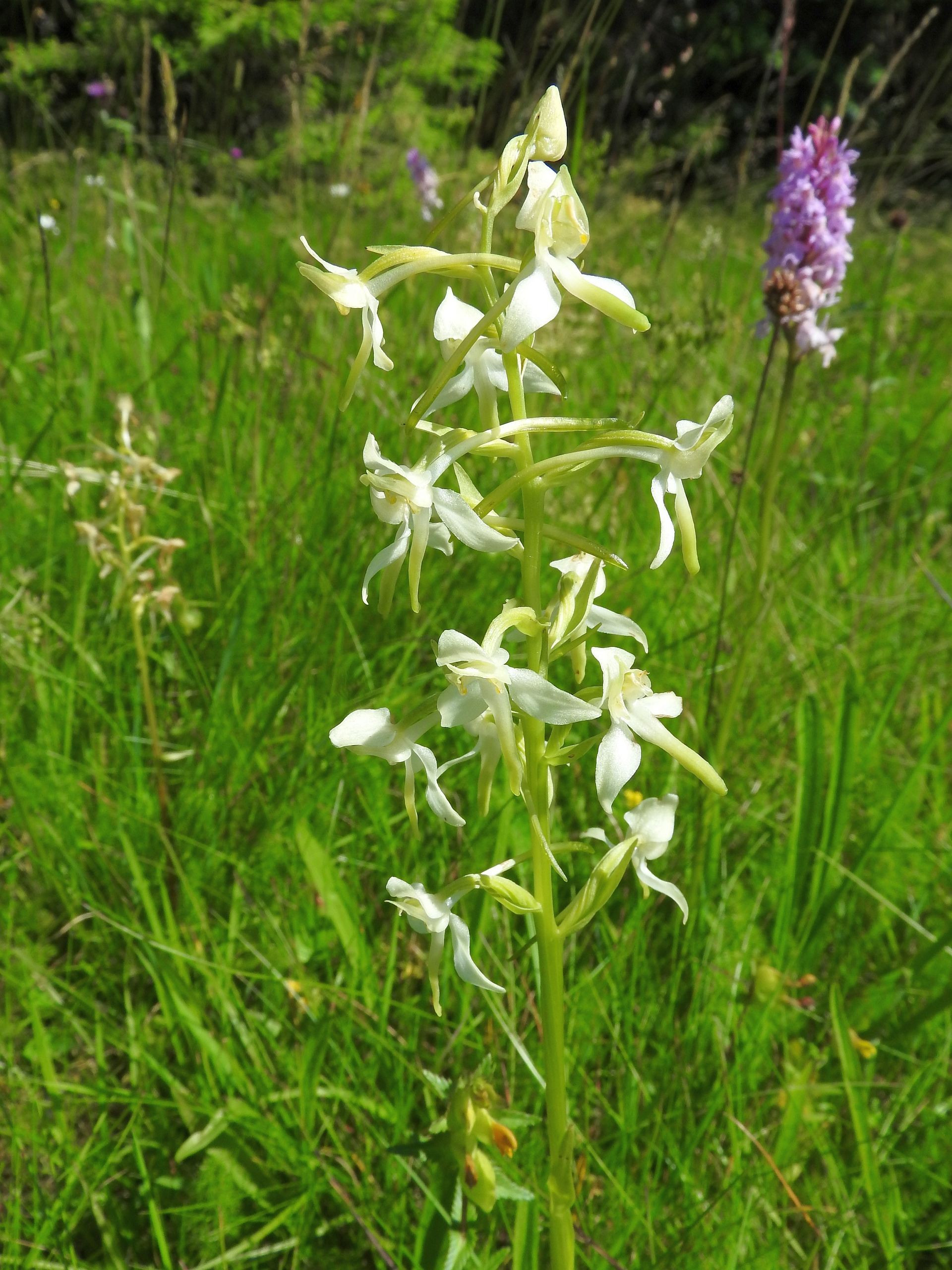 Grünliche Waldhyazinthe (Platanthera chlorantha), Wilhelmshöhe, Schonach im Schwarzwald, 23.06.2018